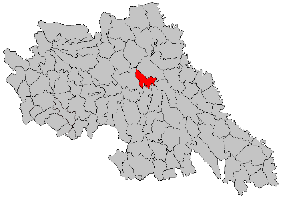 Categorie:Hărţi ale judeţului Iaşi